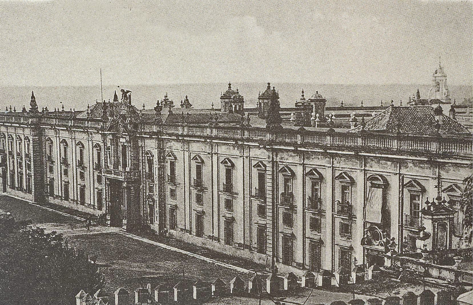 Universidad de Sevilla, Puerta del Rectorado (Calle San Fernando), Sevilla